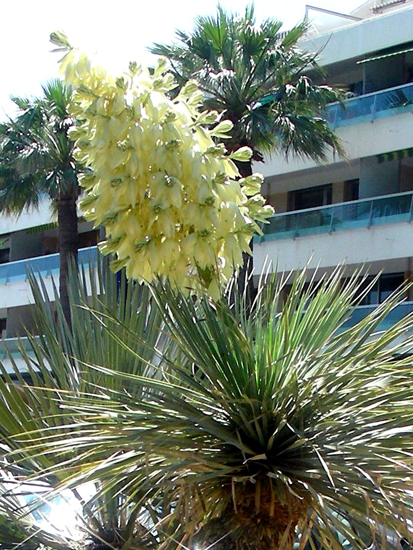 Yucca rostrata : inflorescence